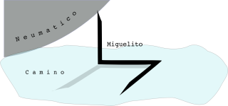 Image for Miguelito